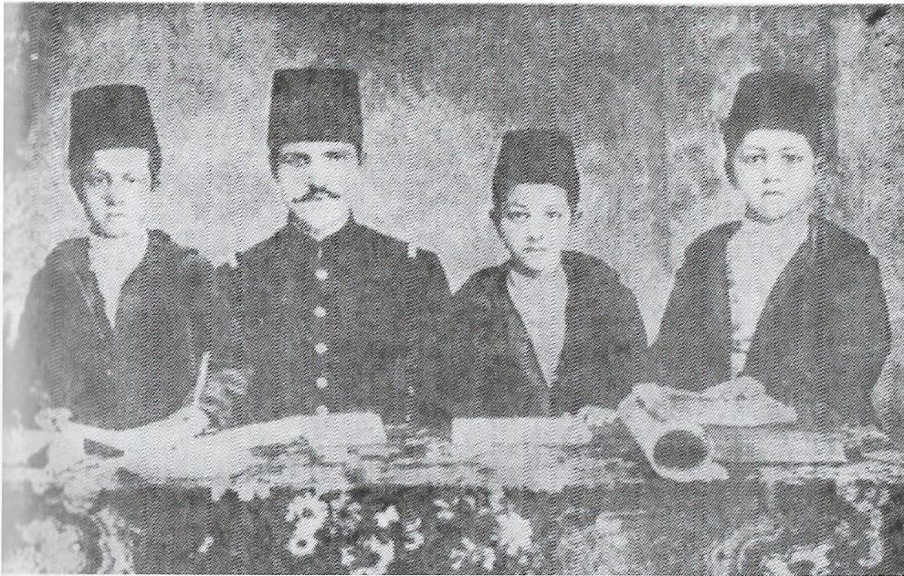 A gauche le jeune Fayçal accompagné de ses frères et de leur précepteur Ahmed Safwat. Photo prise à Istanbul vers 1895.